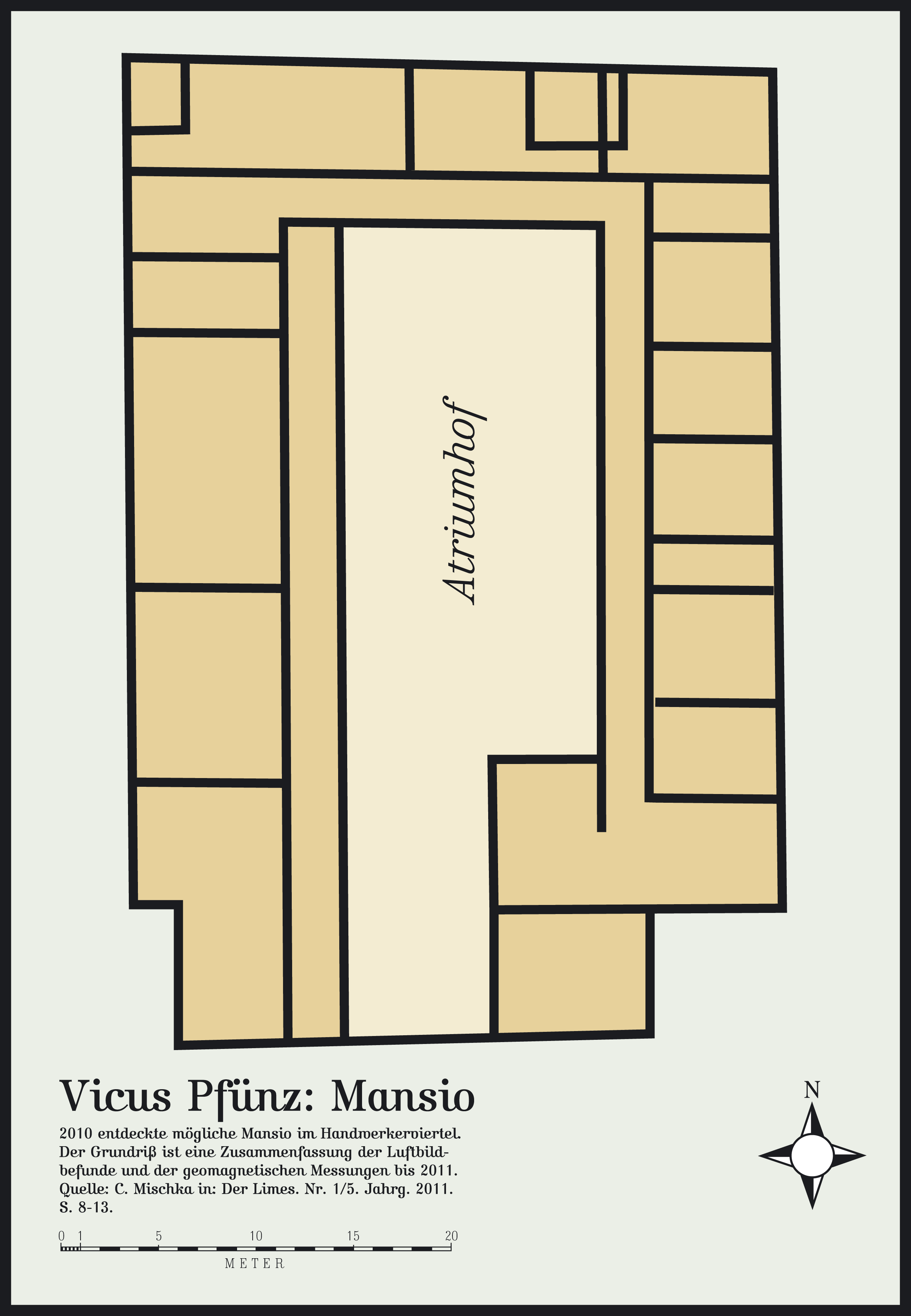 Kastell Pfünz, Raetia, UNESCO-Weltkulturerbe. Im Sommer 2010 wurden bei einem Luftbildüberflug in einem Feld Strukturen eines komplexen, rund 40 × 34 Meter großen rechteckigen Gebäudes sichtbar, das als Mansio gedeutet wurde.